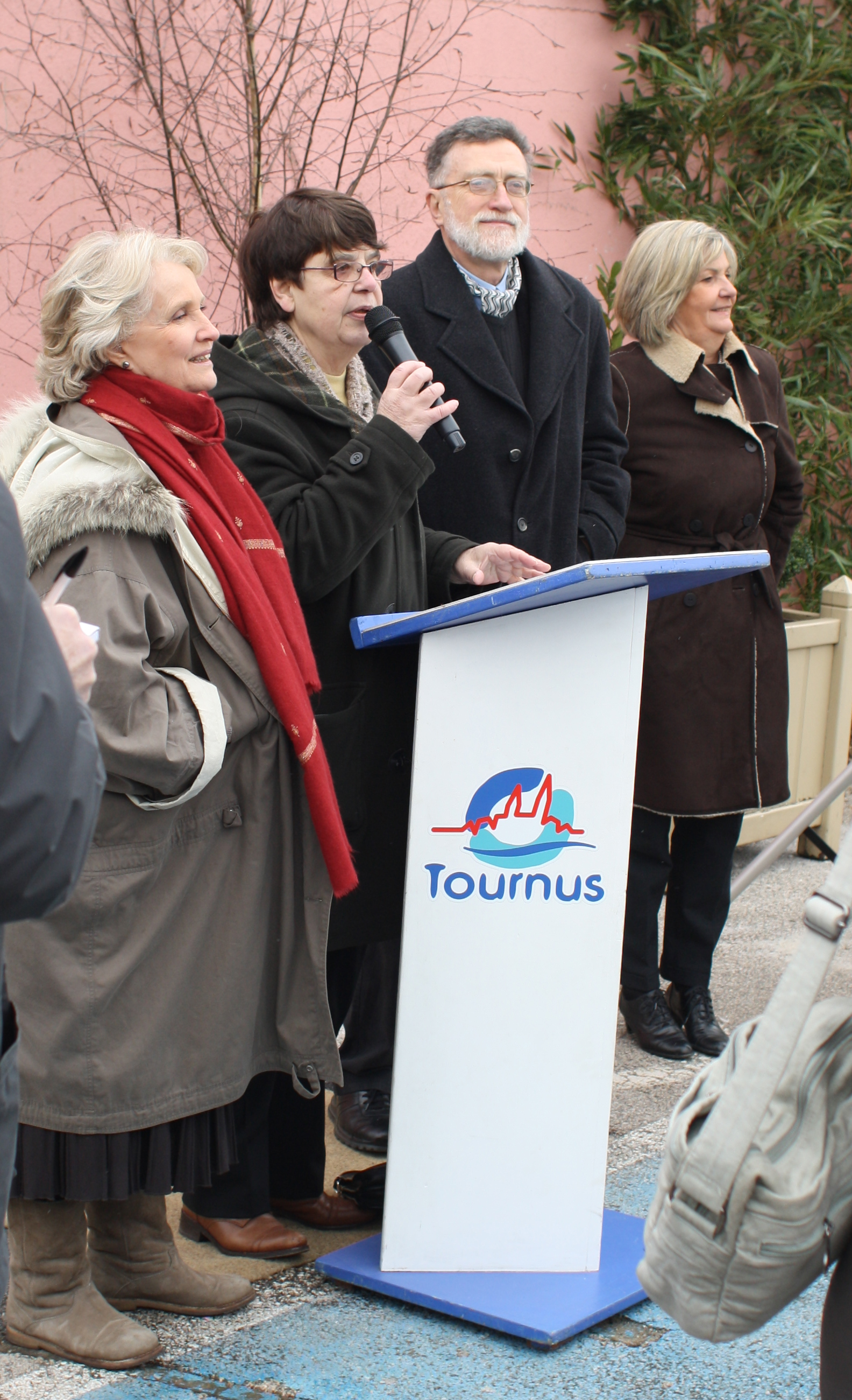 Marie-Christine Barrault (à gauche) inaugure la place Jean-Louis Barrault à Tournus (France). Cette place est située à proximité immédiate du Madeleine Palace, salle de spectacle inaugurée en 1955 par la compagnie de Jean-Louis Barrault.